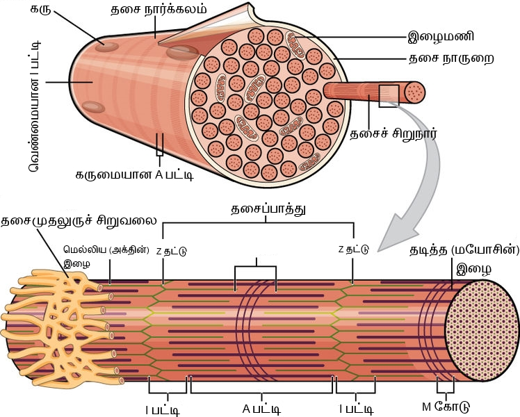 வன்கூட்டுத் தசையின் நுண்கட்டமைப்பு